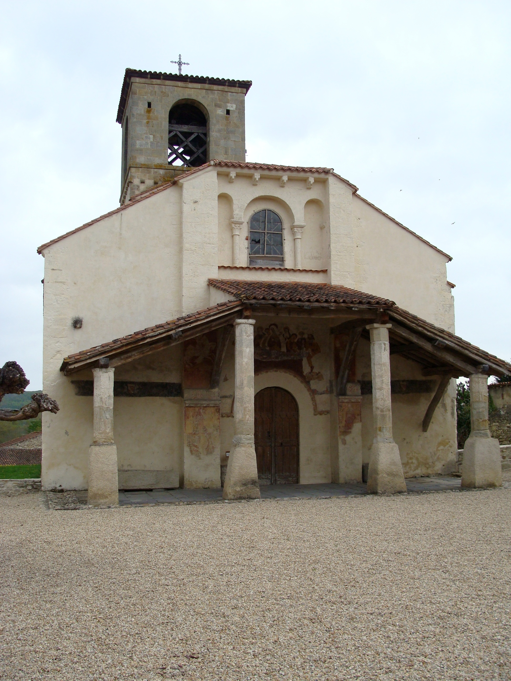 Église Saint-Pierre-aux-Liens de Moissat-Bas : Vue d'ensemble. Les peintures murales extérieures sont visibles sous les piliers du porche. .